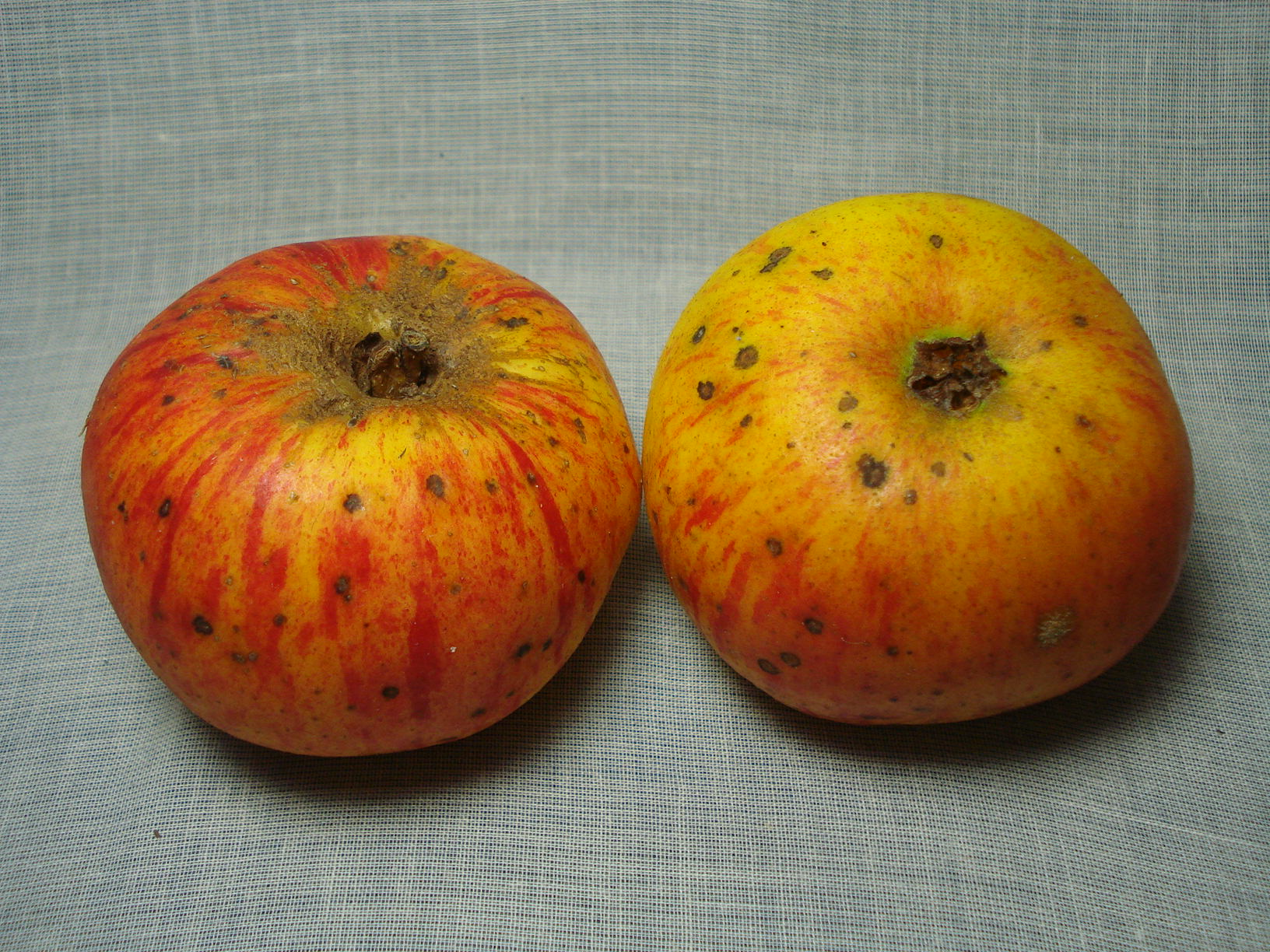 Jakob Lebel